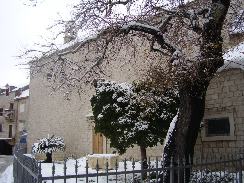 crkva sv.Ivana Krstitelja u Kaštel Starom